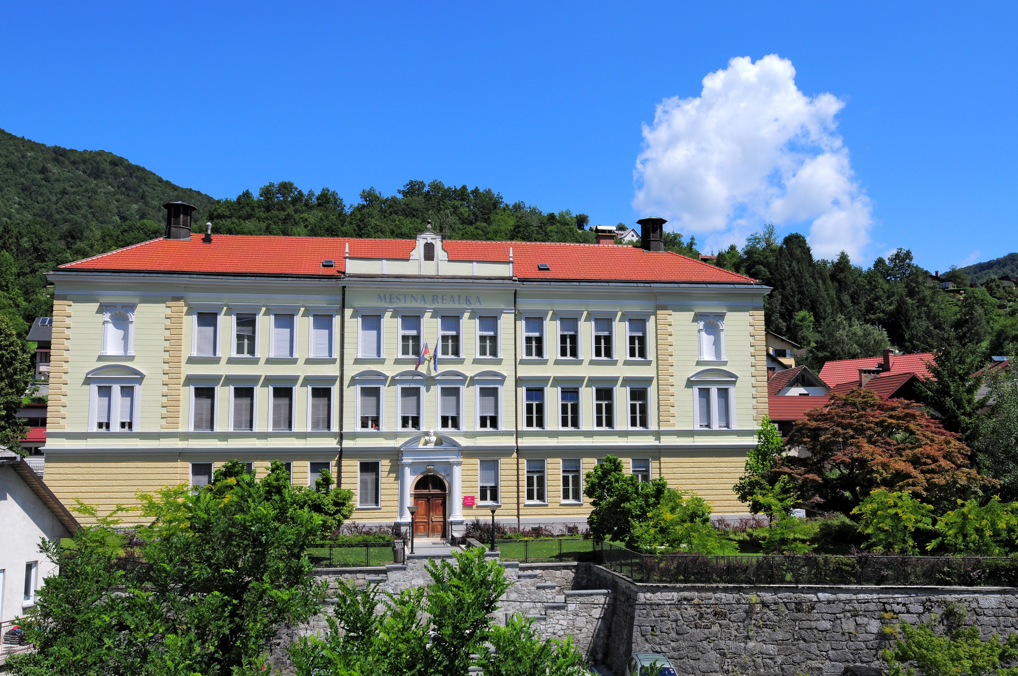 Gimnazija jurija Vege Idrija